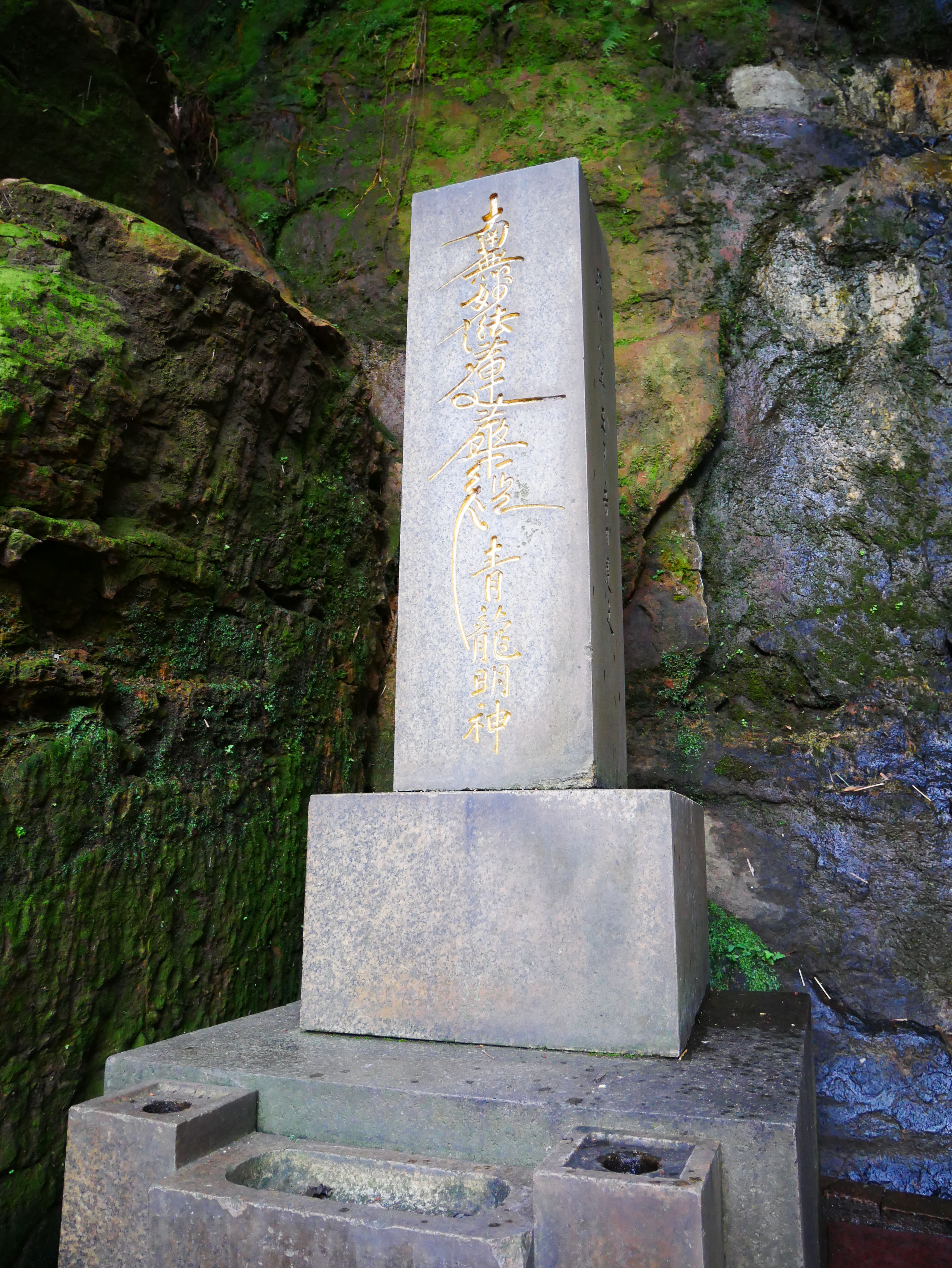 青龍明神題目塔（昭和八年五月吉日建之），臺北市北投區新北投次分區林泉里